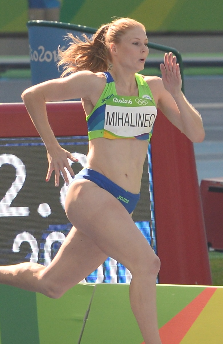 Maja Mihalinec dans la 1er série du 200m aux JO de Rio 2016